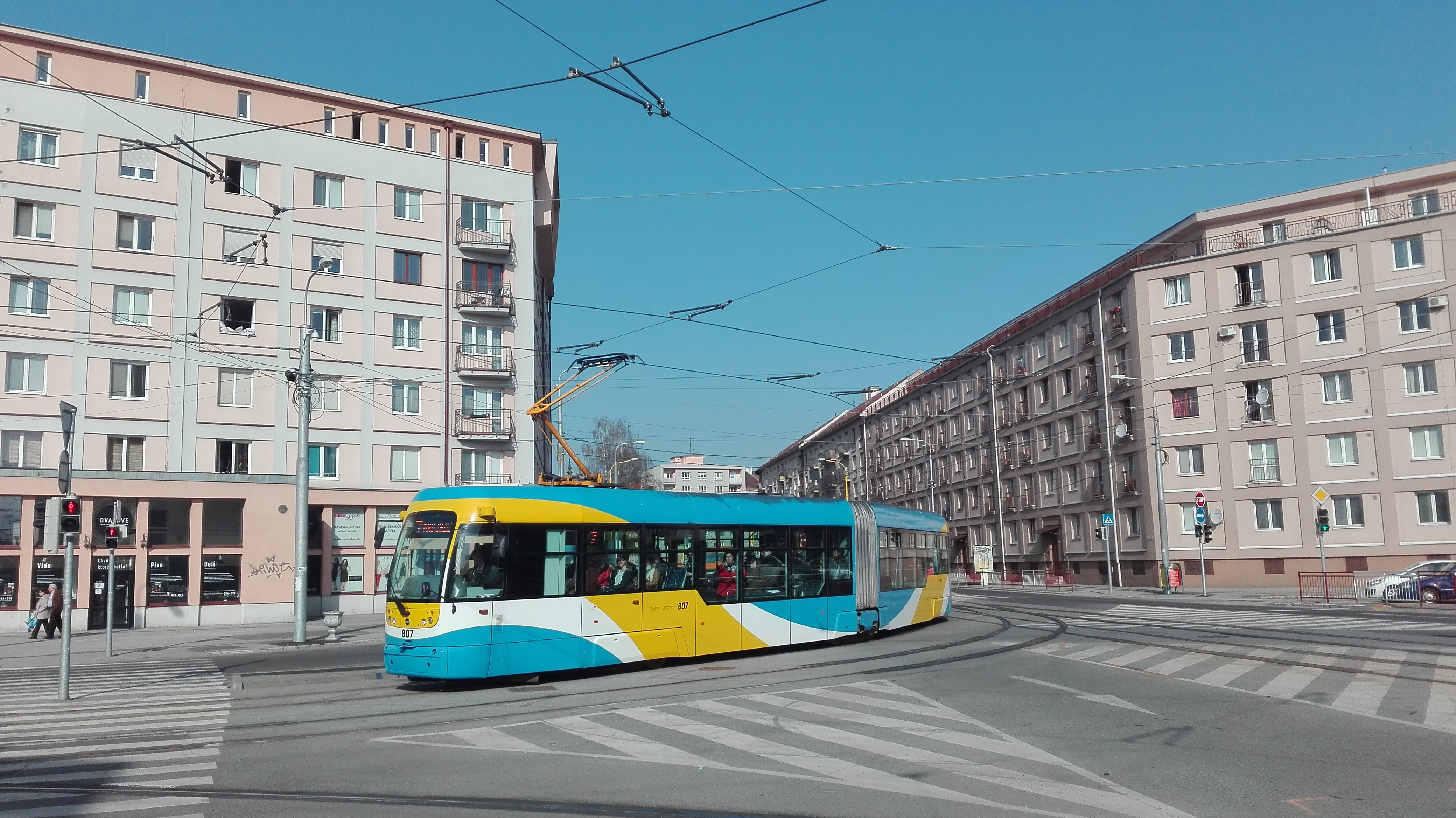 Košice, električka Vario na ulici Československej armády, 2016